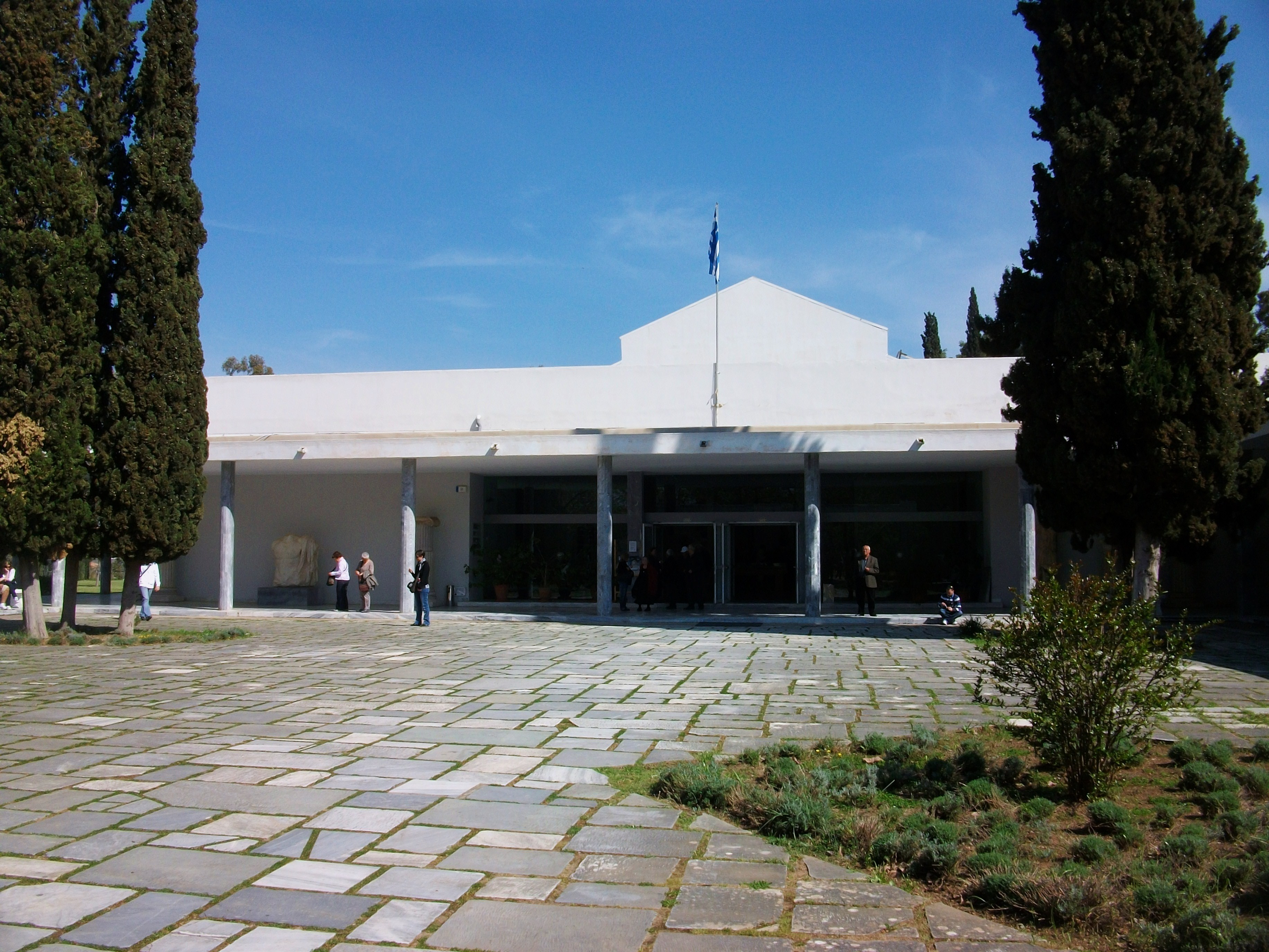 Museu arqueològic d'Olímpia, exterior.